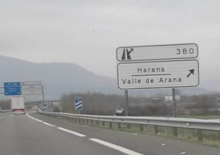 Harana haraneko seinalea. Tautotoponimo bat da. Seinalea izatez Agurainen dago, Haranatik kilometro batzuetara.